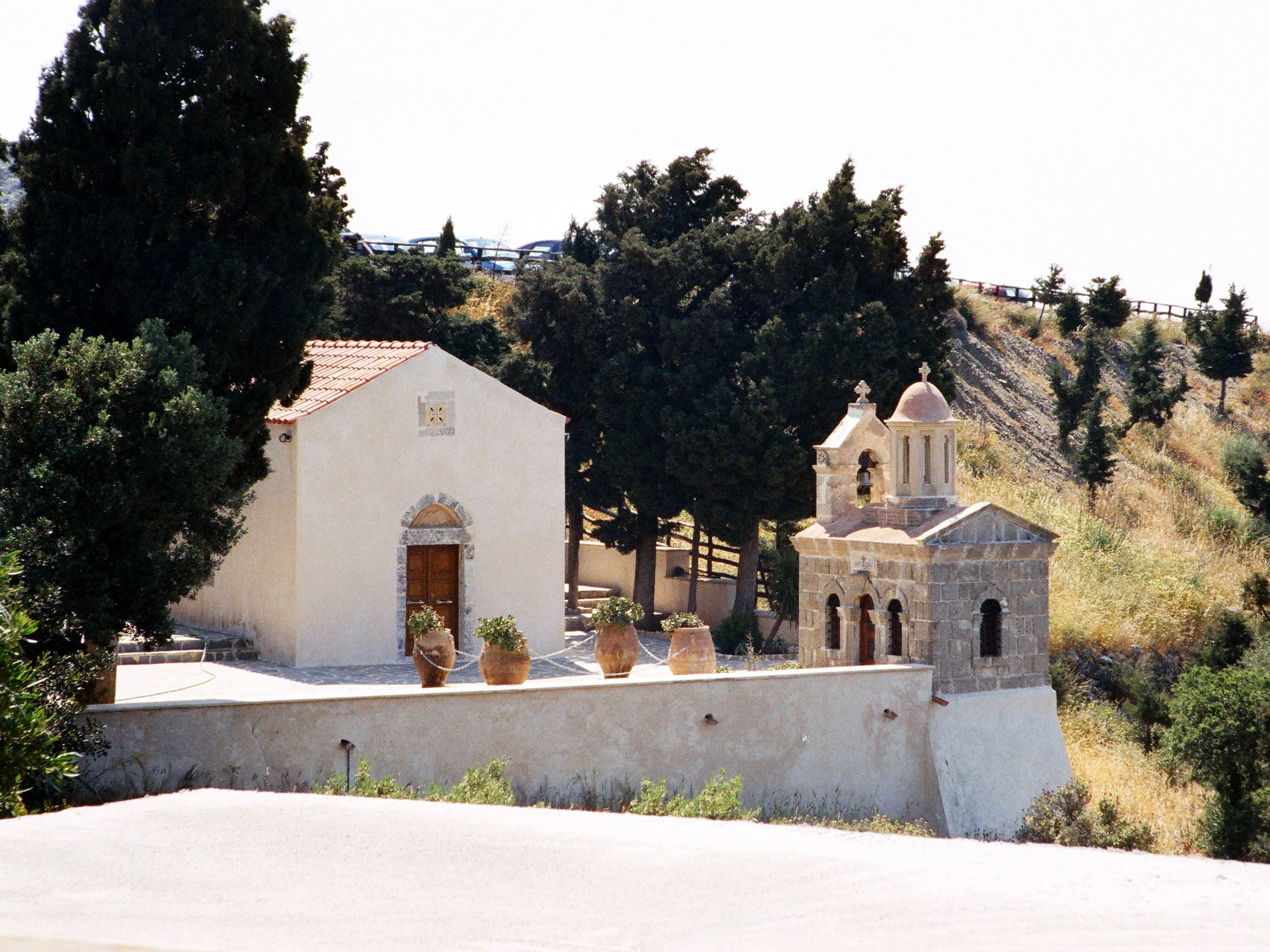 Mönchskloster Moni Preveli, Kreta (Griechenland)